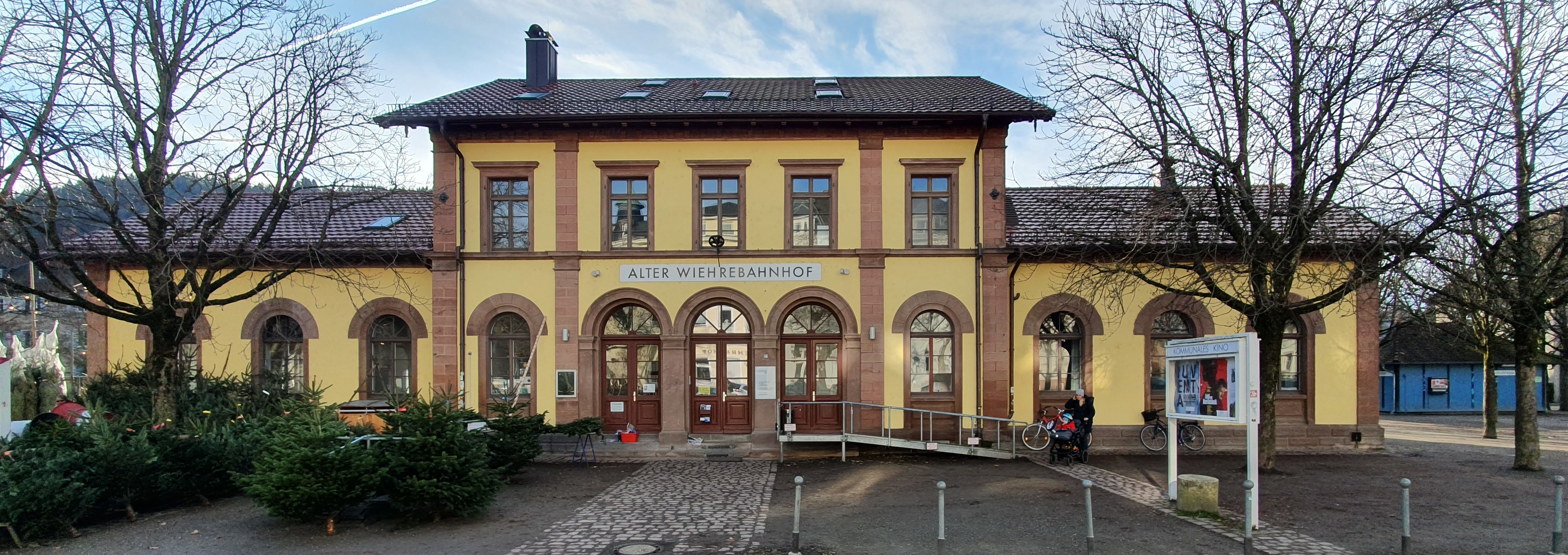 Kommunales Kino Freiburg - Der Alte Wiehrebahnhof in Freiburg - Dezember 2019